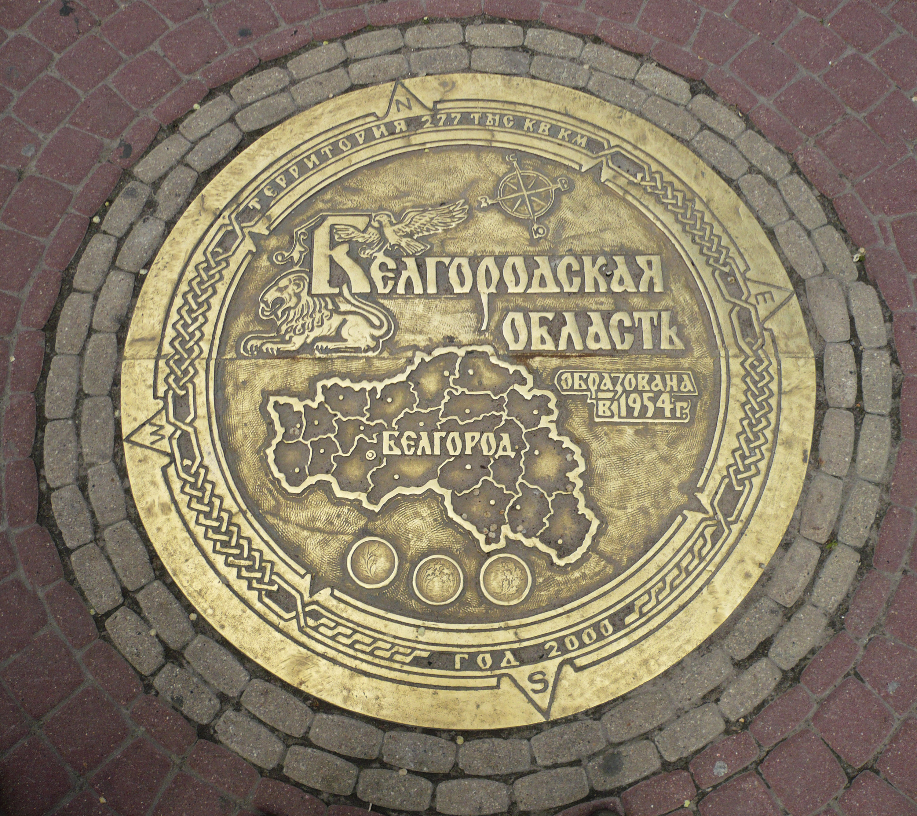 Плита "Белгородская-область" на Соборной площади Белгорода